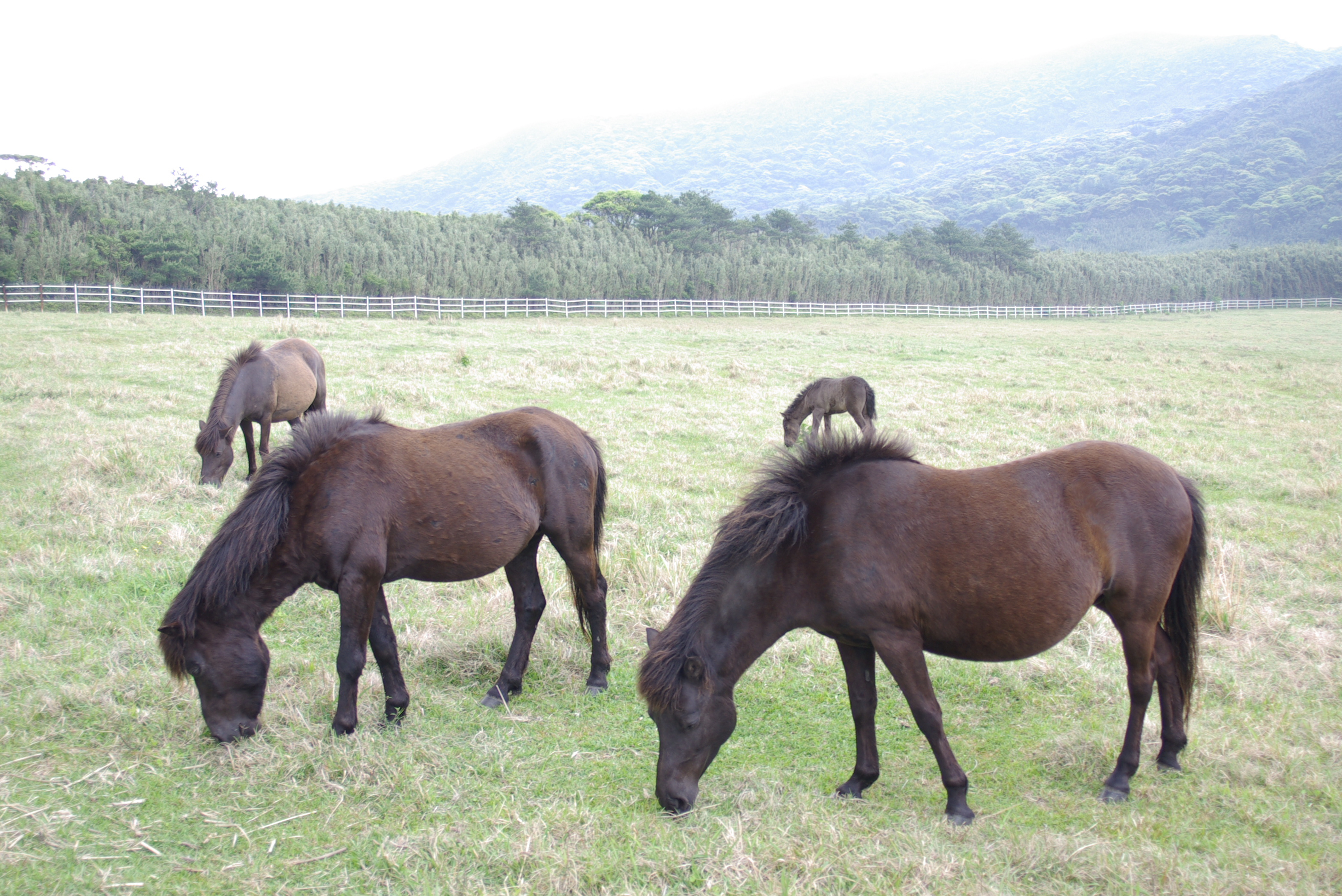 牧草を食むトカラウマたち